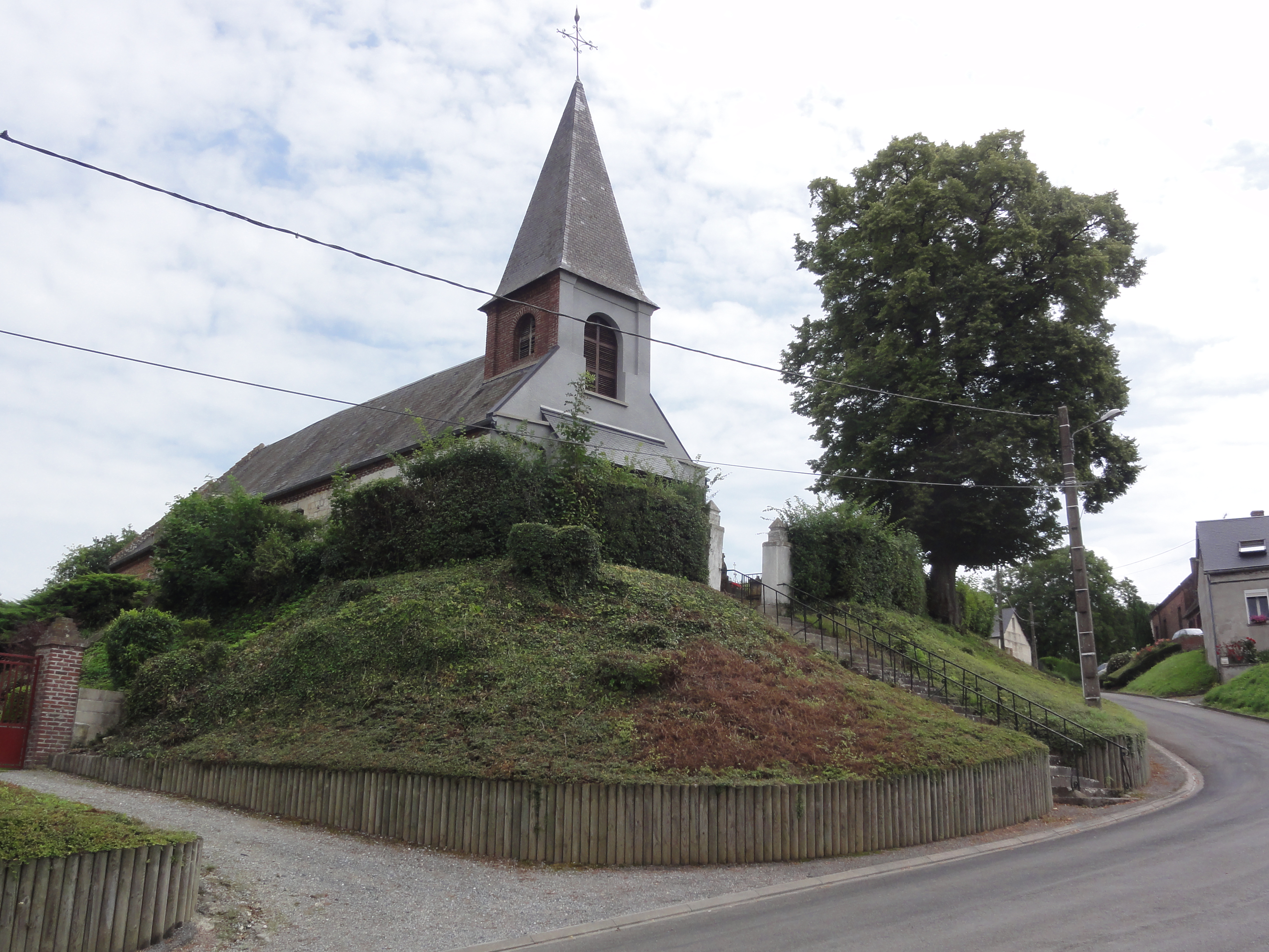 Proix (Aisne) église